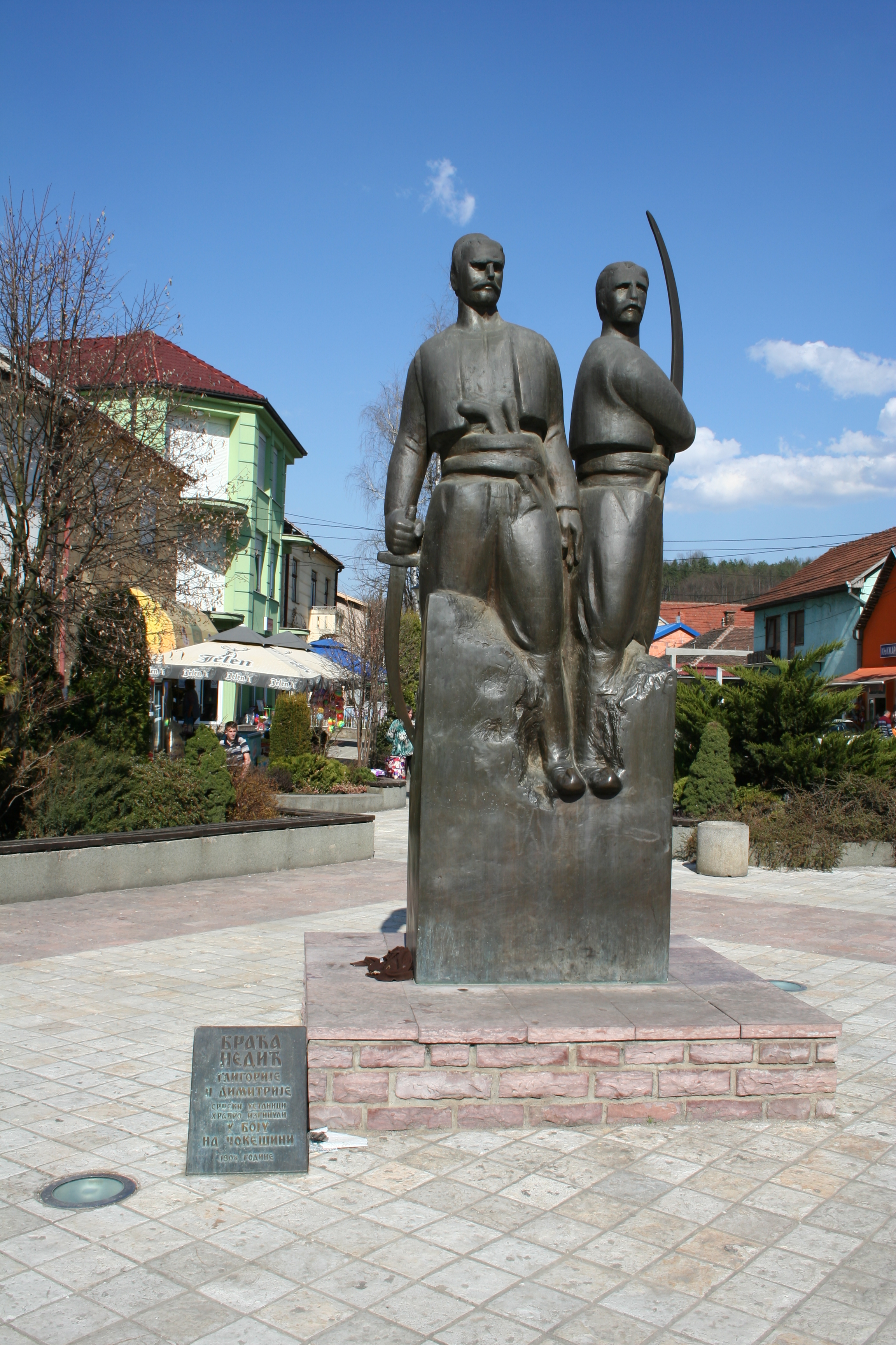 Spomenici i zgrade u Osečini